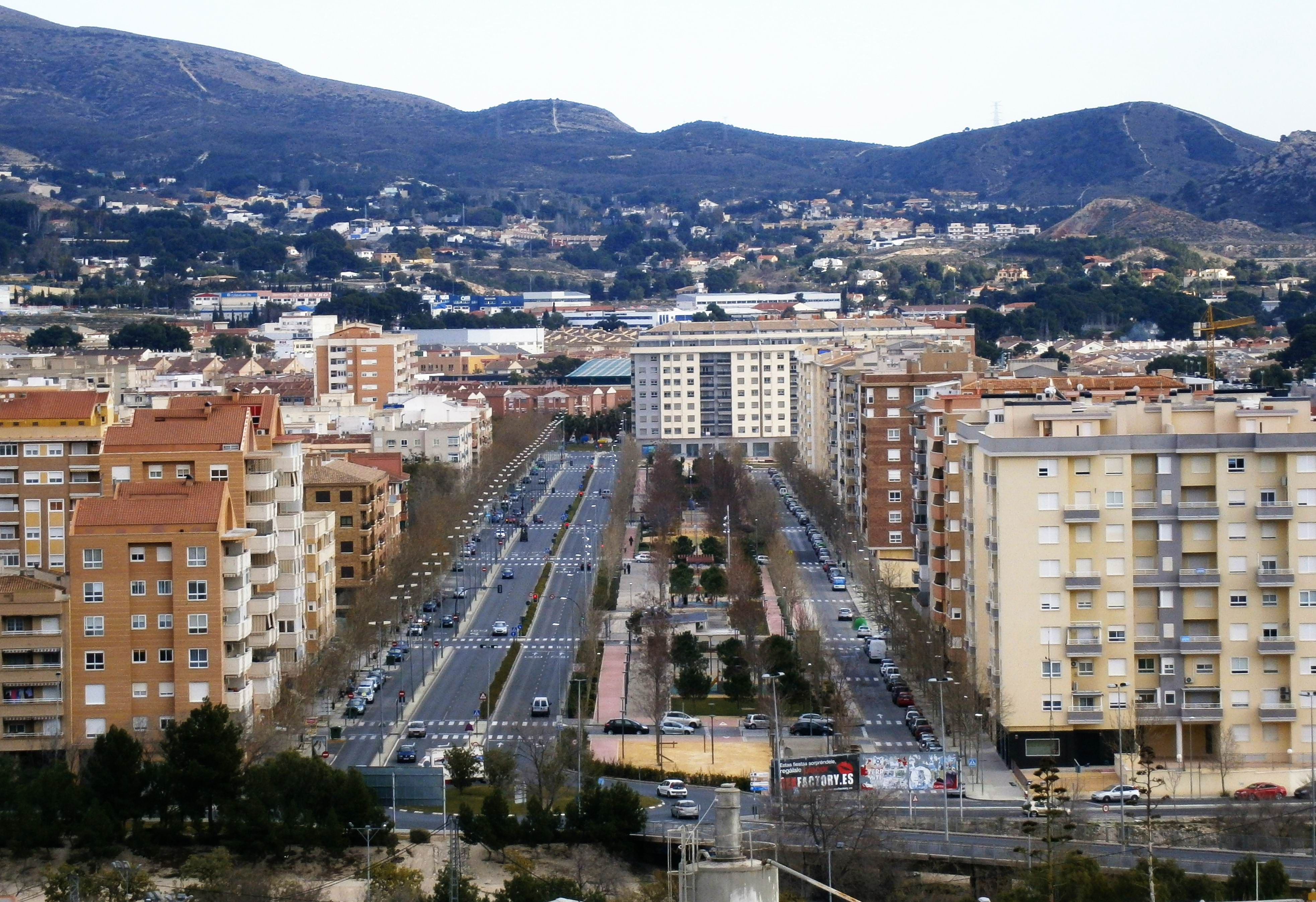 Avenida de Ronda de Elda. Sector occidental